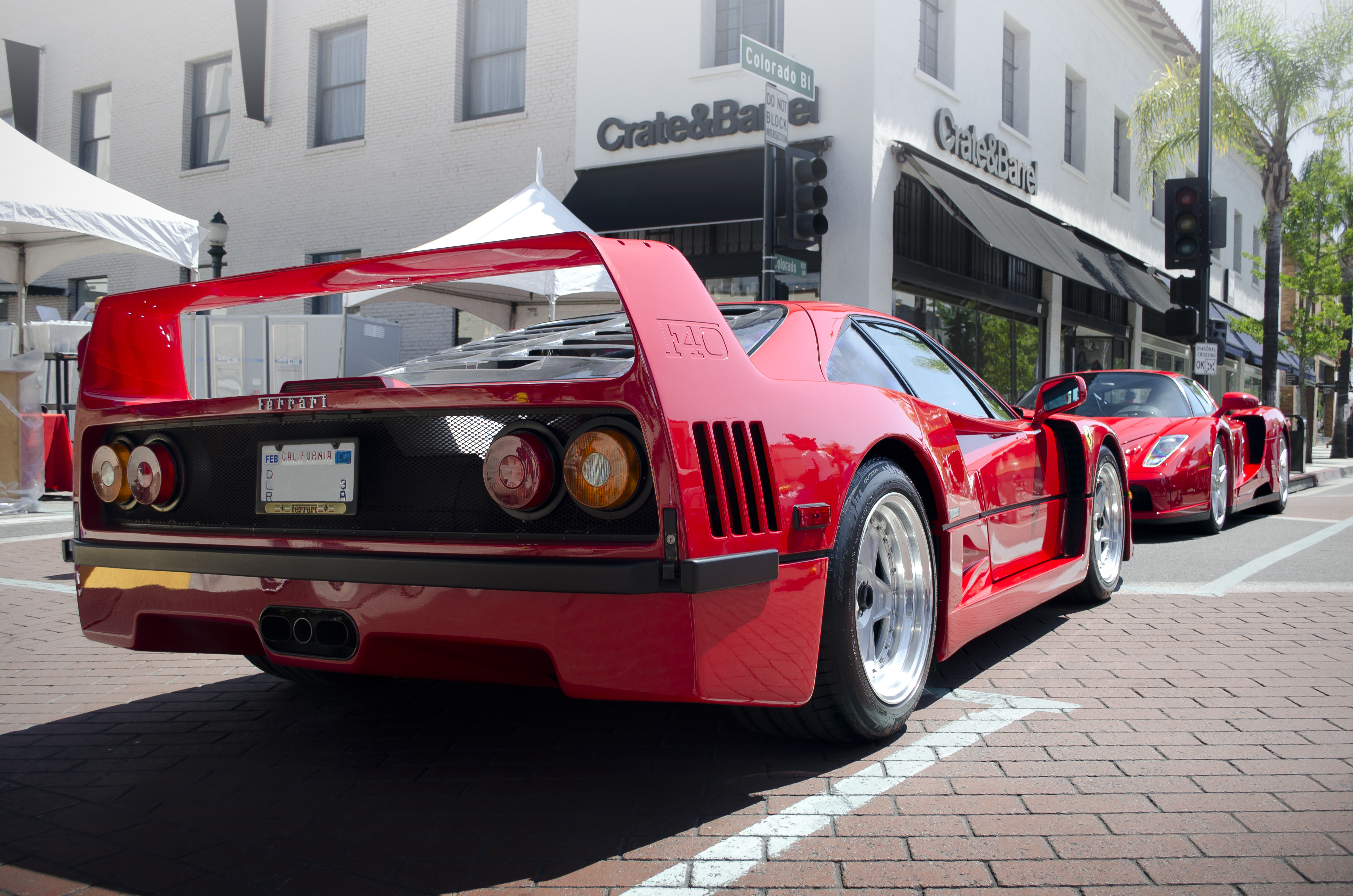 Ferrari F40 and Enzo at Concorso Ferrari in Pasadena. 5-19-13